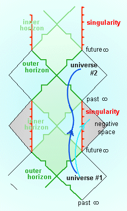 Kerr passway